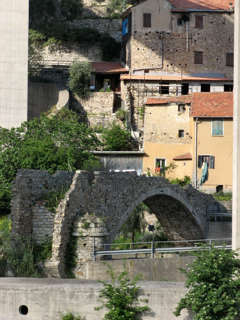 Ruderi del ponte medioevale sull'Impero, a Castelvecchio, Imperia, Italy